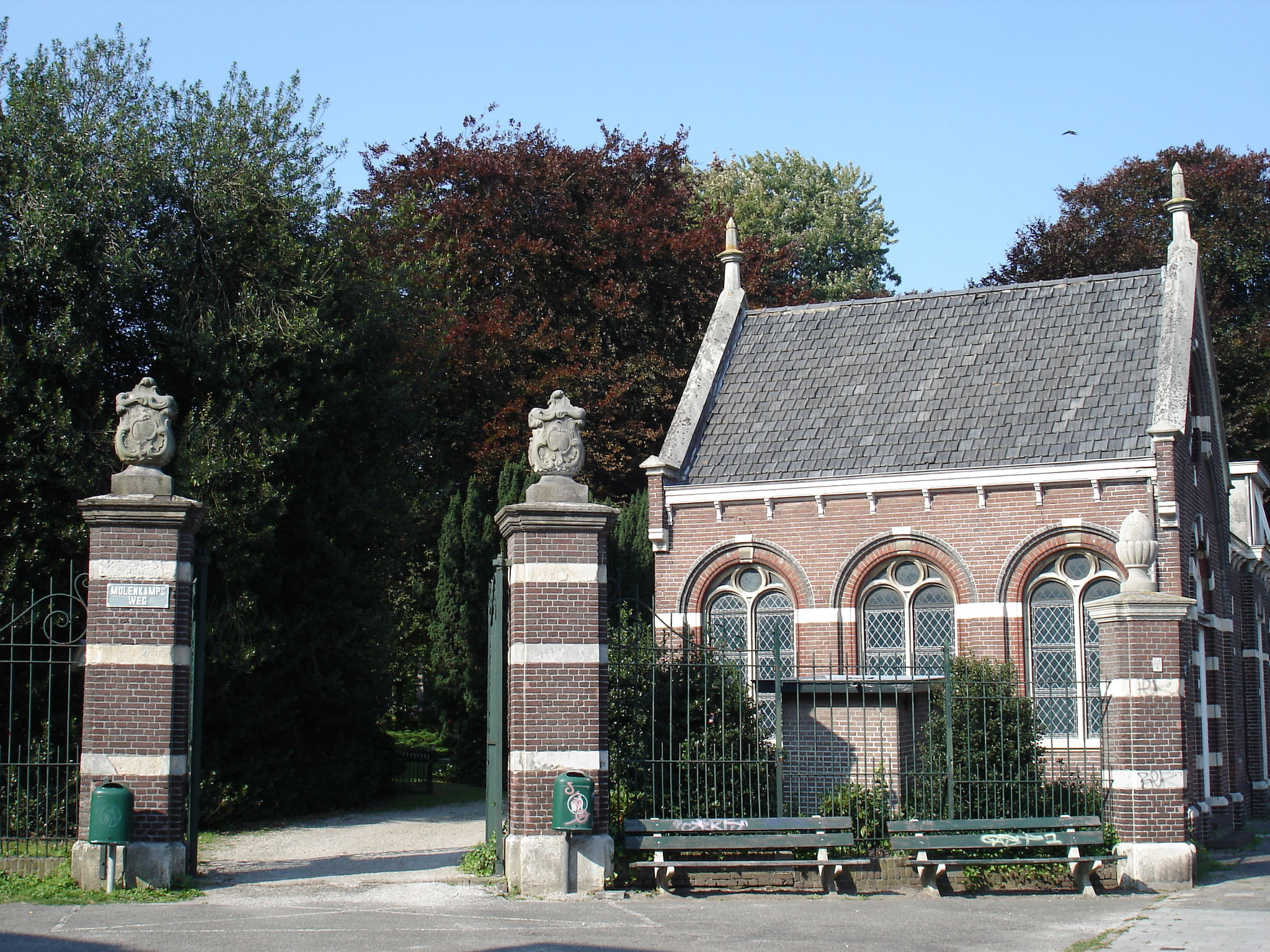 Begraafplaats Meppelerstraatweg in Zwolle.